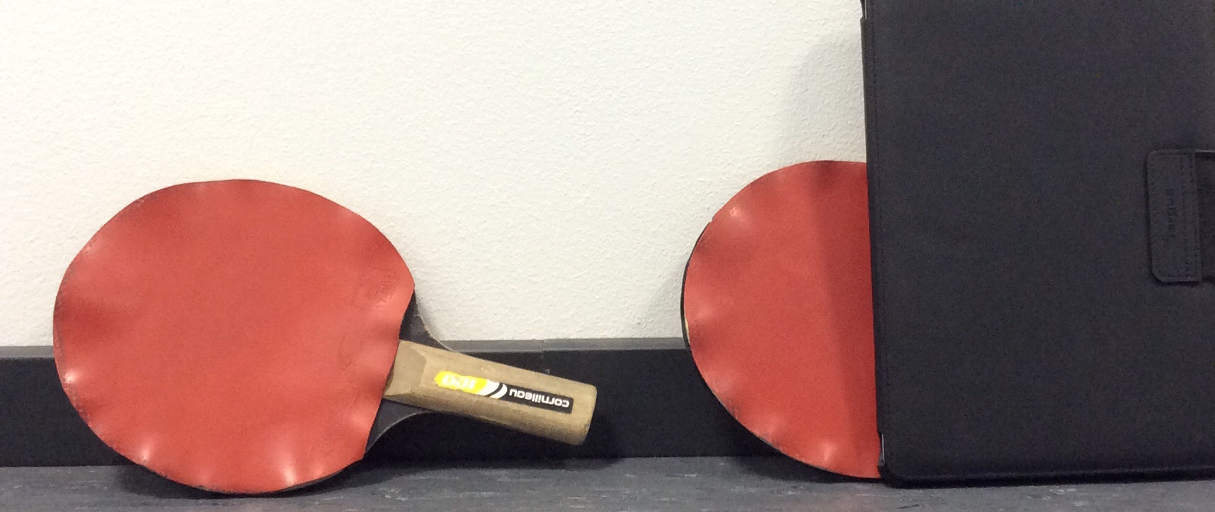 hyvän hahmon laki